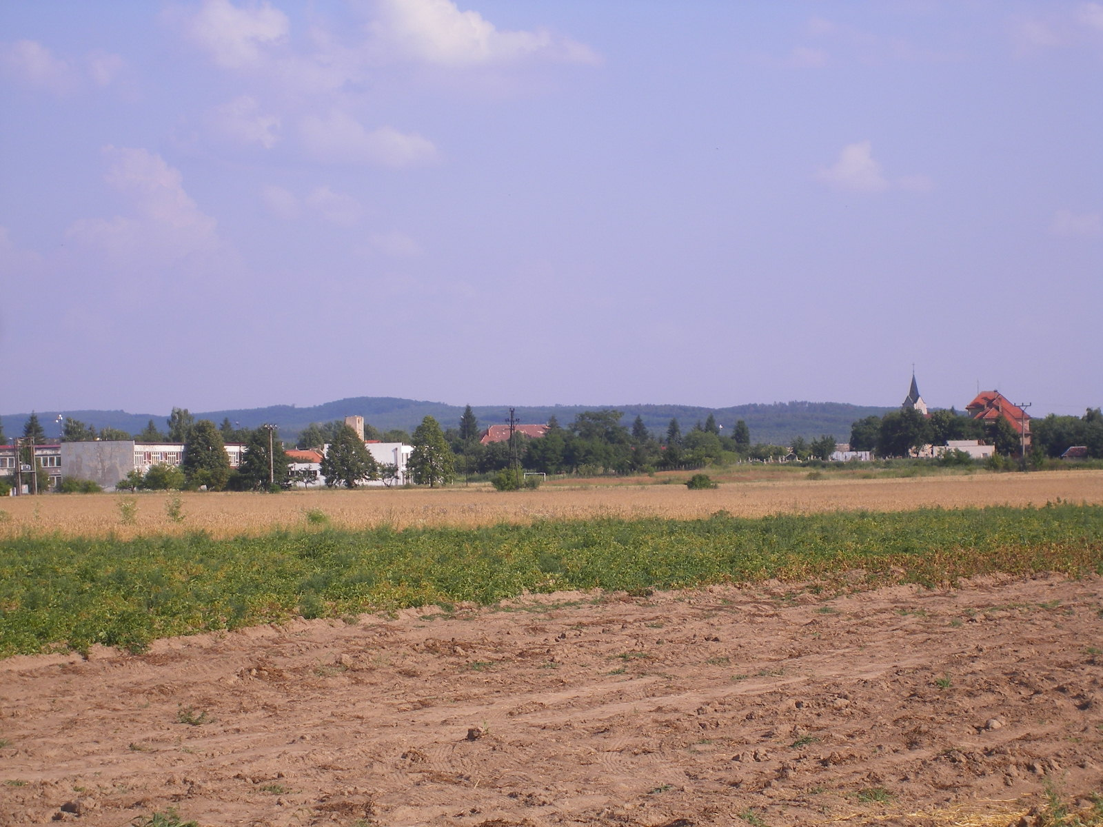 Nagycsalomja - a falu látképe észak felől